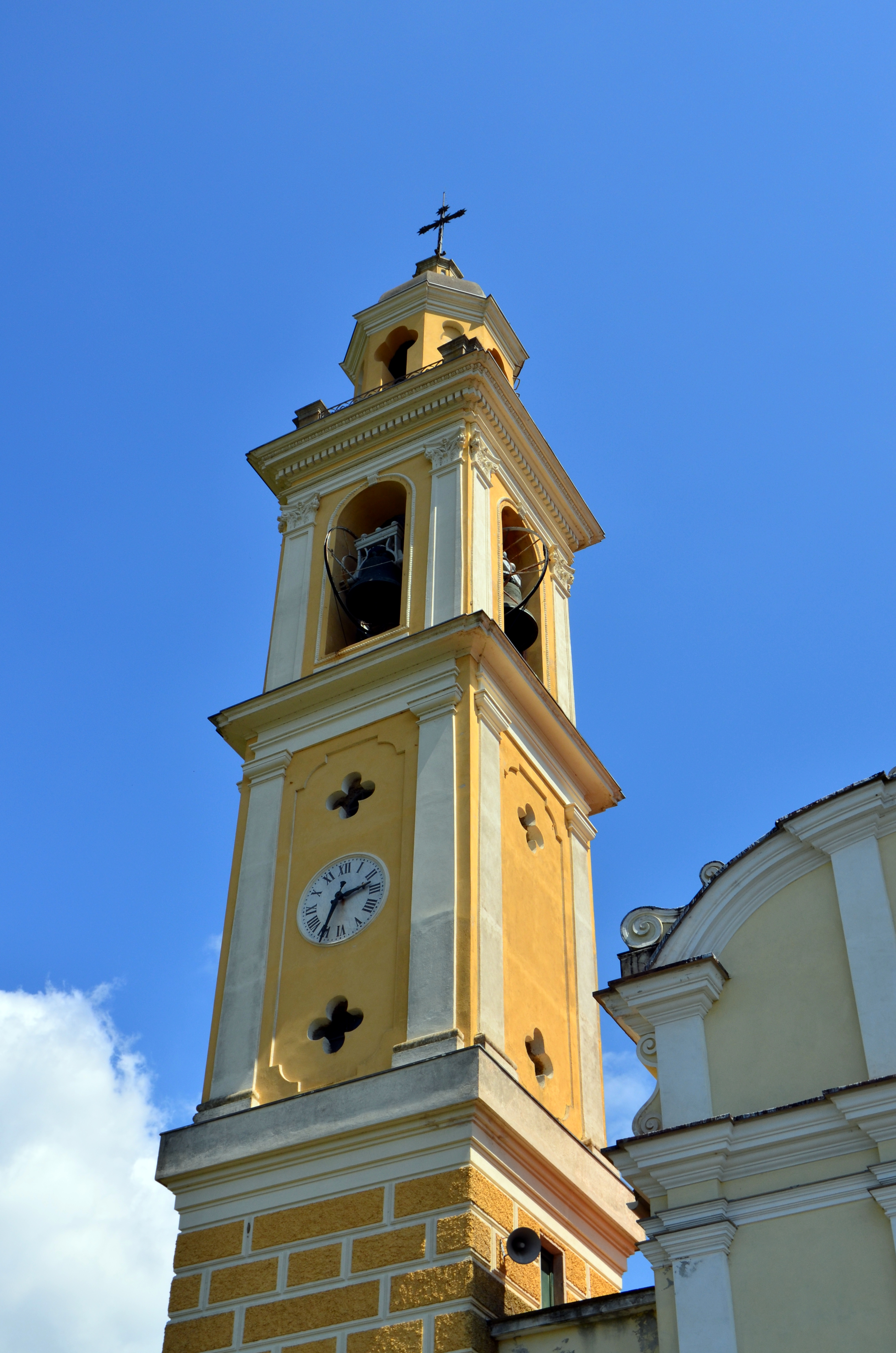 Chiesa di Santa Maria in Monticelli, Cogorno, Liguria, Italy